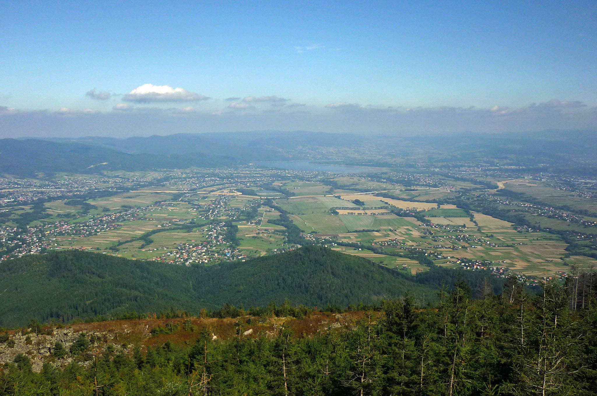 Blick vom Gr. Skrzyczne auf Zywiec